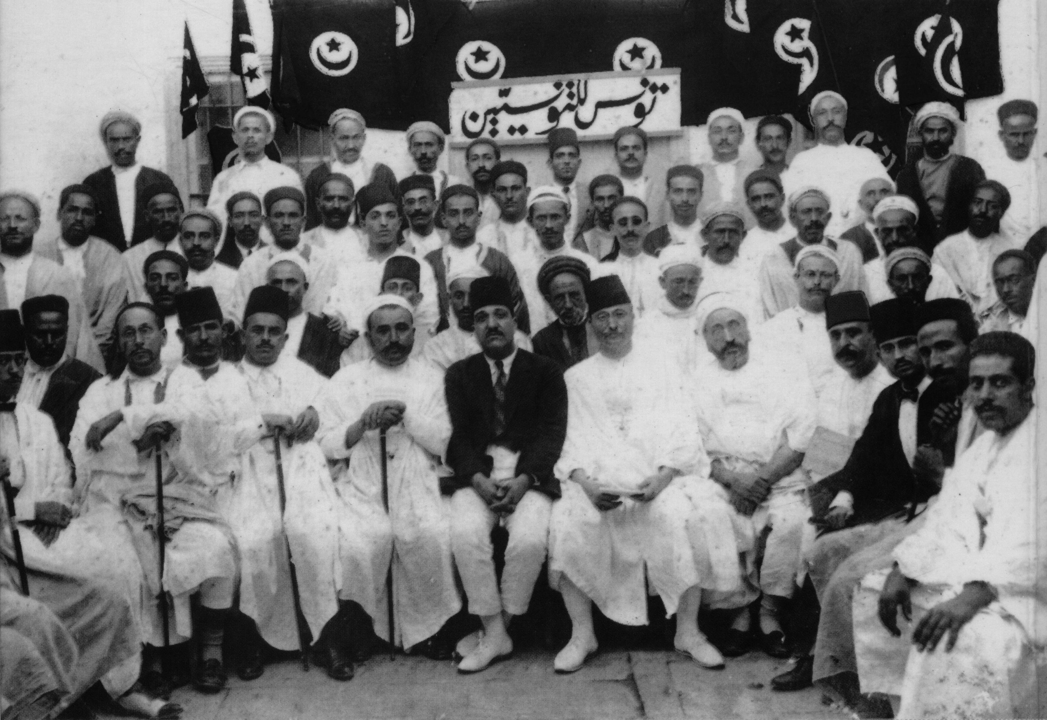 Destour